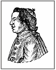 Gian Gabriello Maccafani, storico nato a Pereto